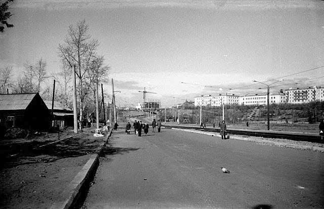 ул. Балтахинова 1980-е